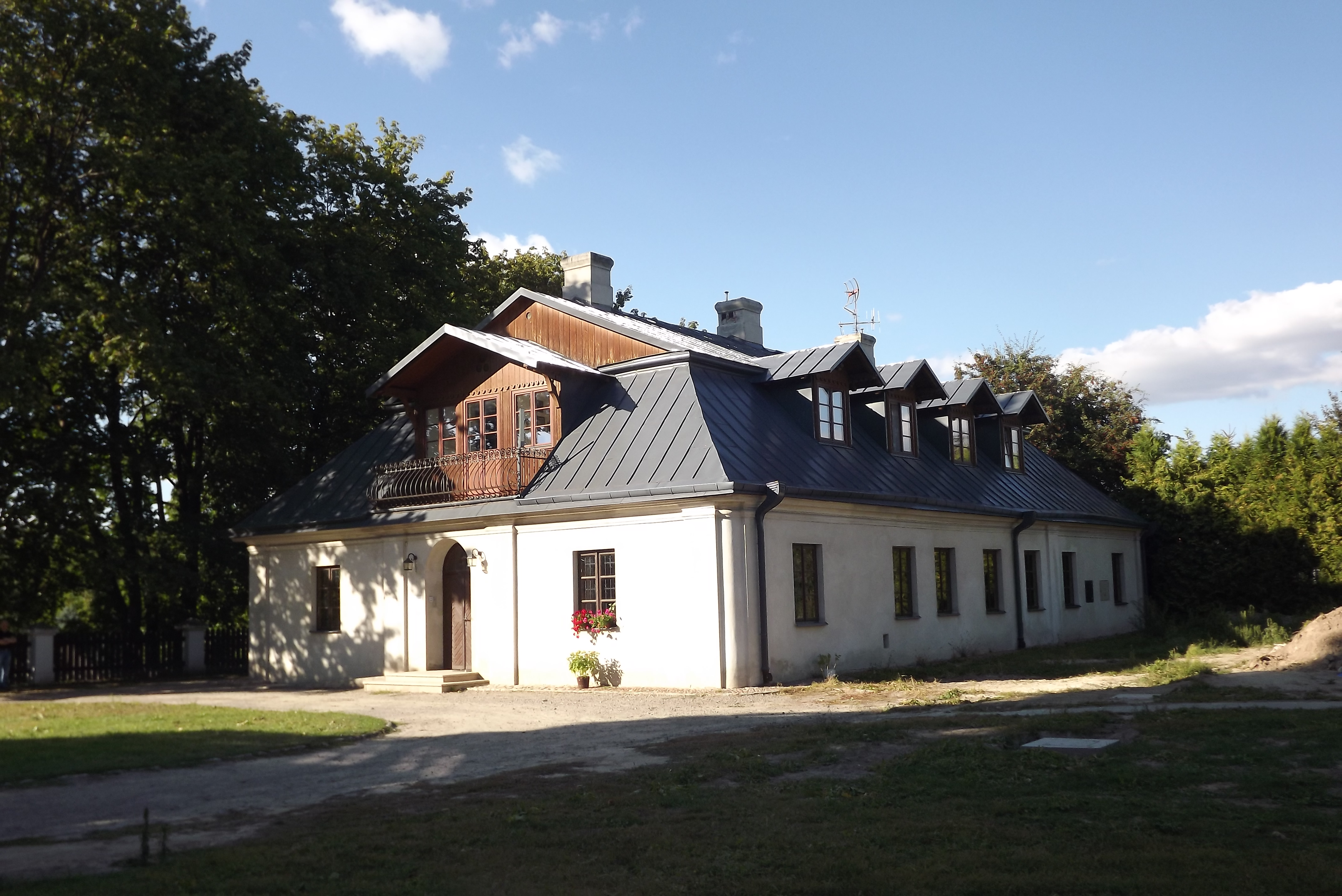 Łęczna, plebania -XVII-wieczny budynek. Dawniej zamieszkiwali tu mansjonarze (wg dokumentów kościelnych było ich tu czterech). Nie wiadomo jednak jaki czas byli w Łęcznej. Po 11 latach remontu, odzyskała swój dawny blask. Obecnie jest siedzibą parafii.